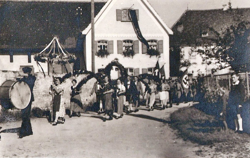 Maifeier